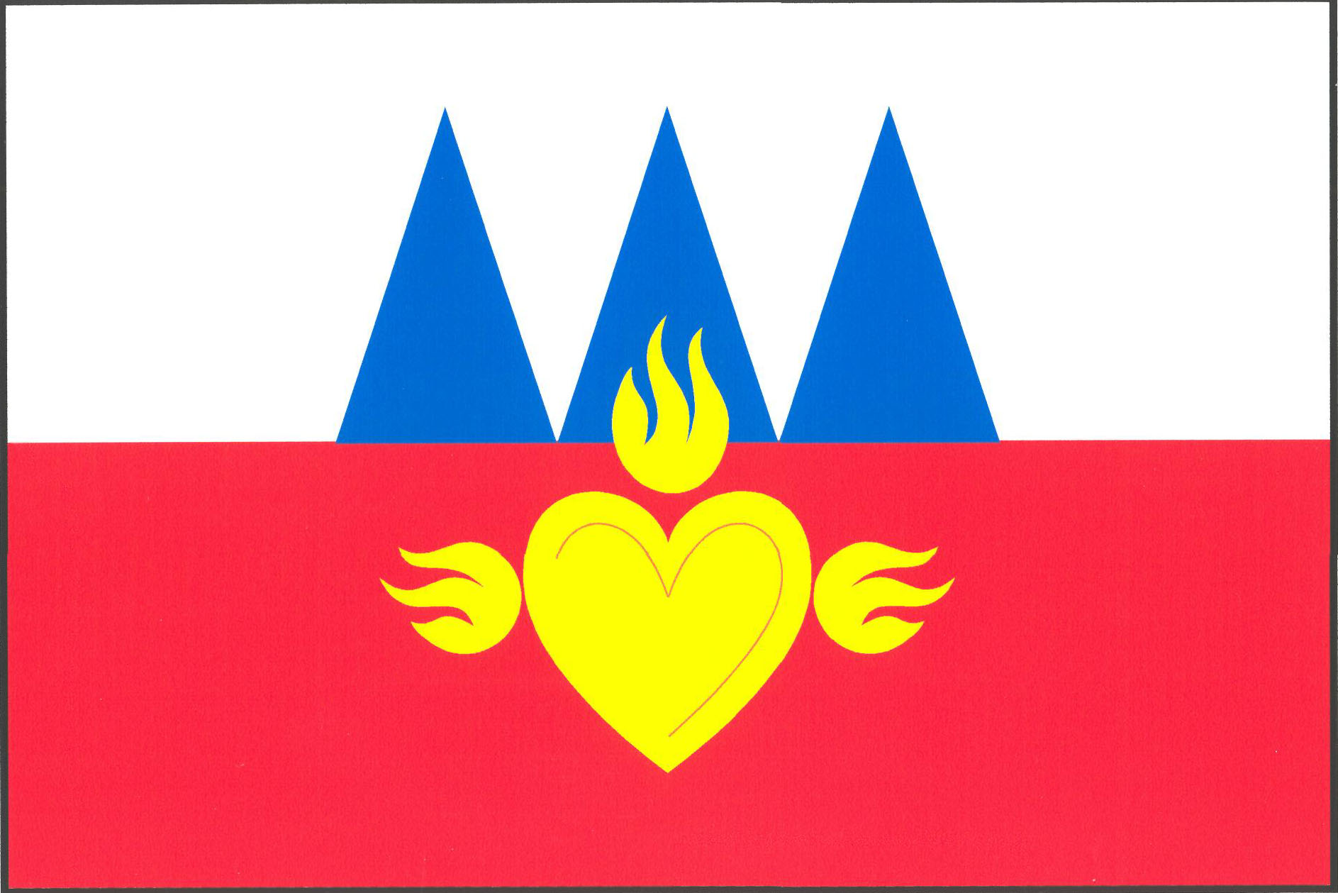 Vlajka obce Ctiboř (okres Tachov)